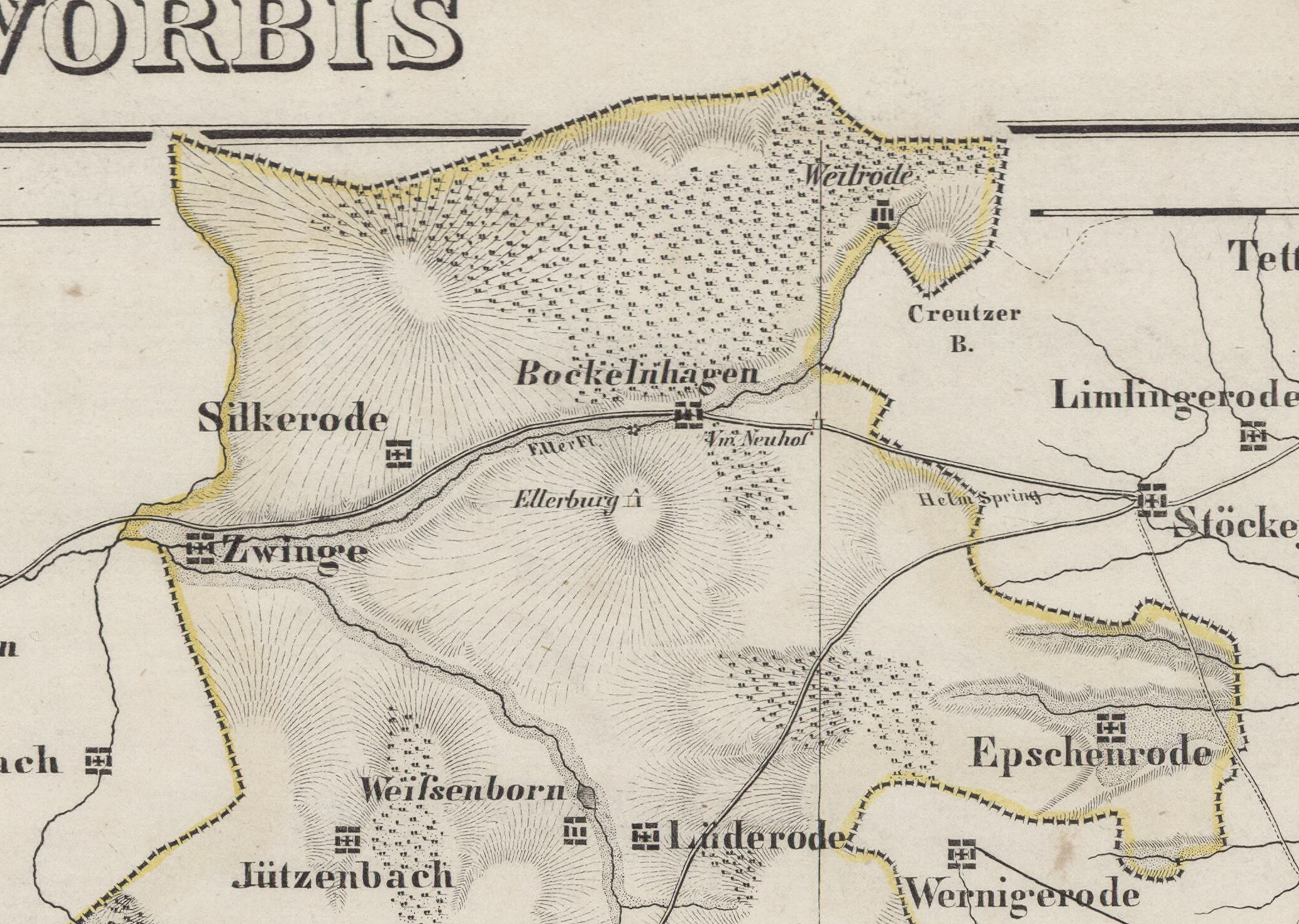 Karte des Kreises Worbis im Jahr 1840, gezeichnet von Albr. Platt, Langensalza bei F. G. E. Gressler